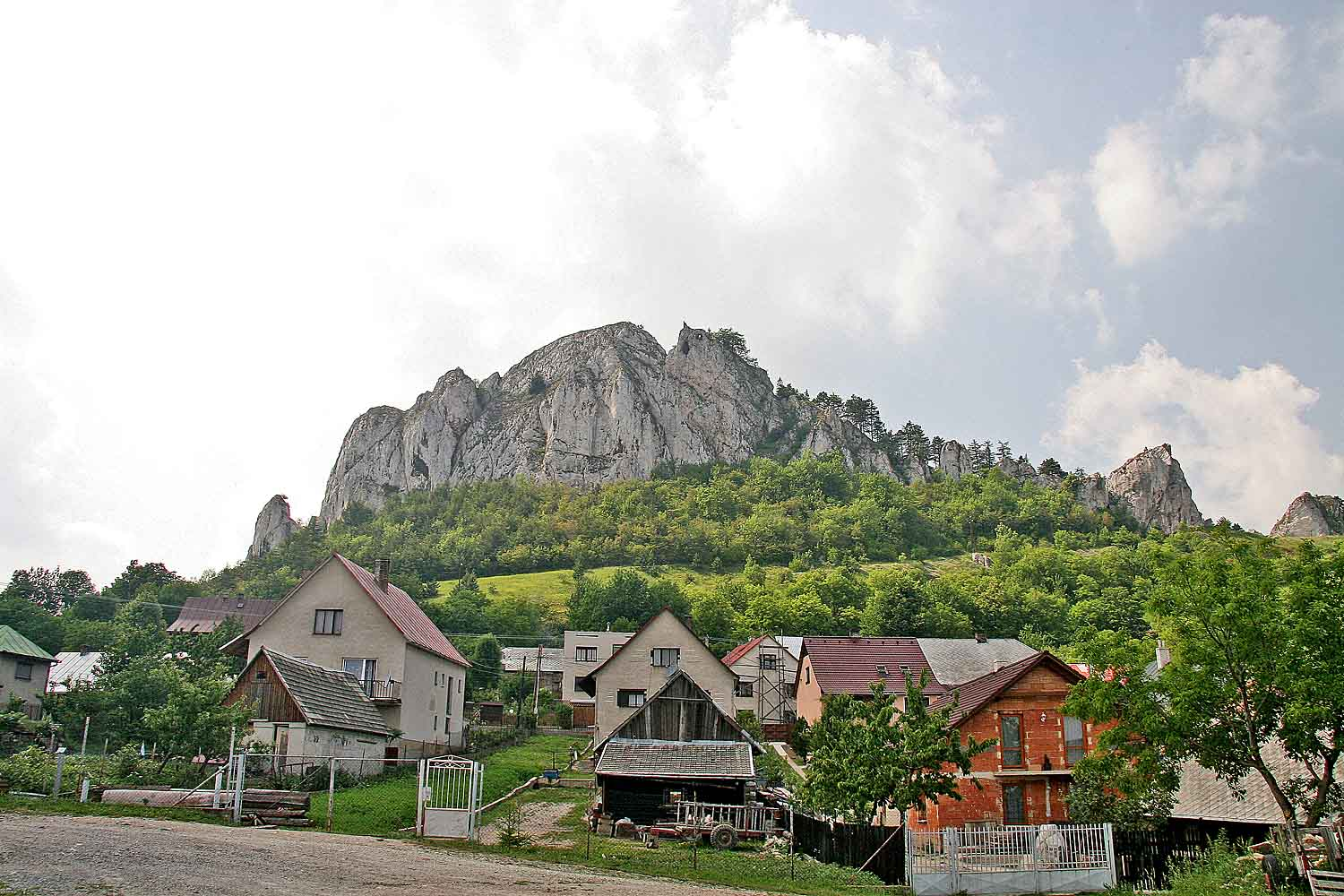 Vršátské_hradné_bradlo, Biele Karpaty, district Ilava, Slovakia autor:Zp